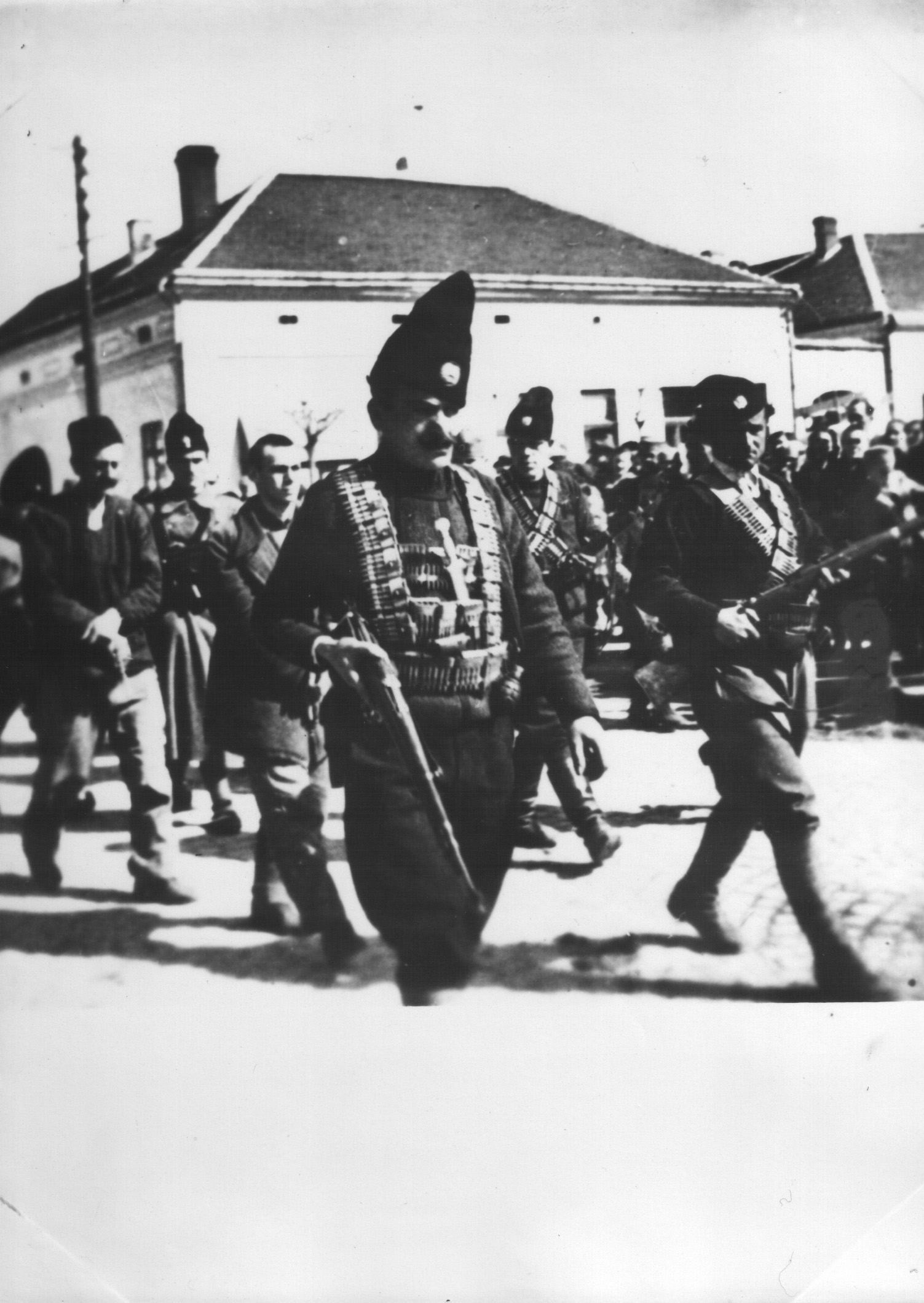 Srpskohrvatski / српскохрватски: Legalni četnici sprovode Stevana Borotu i Josipa Majera na pogubljenje. Stevan Borota, komandir čete Posavsko-tamnavskog partizanskog odreda, i Josip Majer, politički komesar, obešeni su u Valjevu 1942. godine.